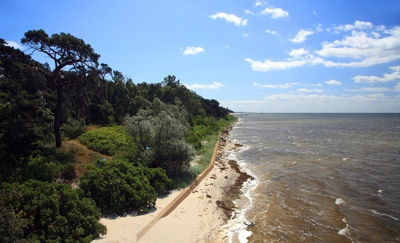 Jurata